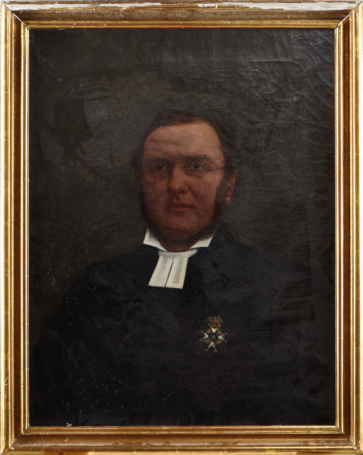 Porträtt föreställande kyrkoherden och riksdagsmannen Jonas Widén (1824-1895). Widén bär prästkappa, med prästkrage samt Nordstjärneordens ordenstecken på bröstet.